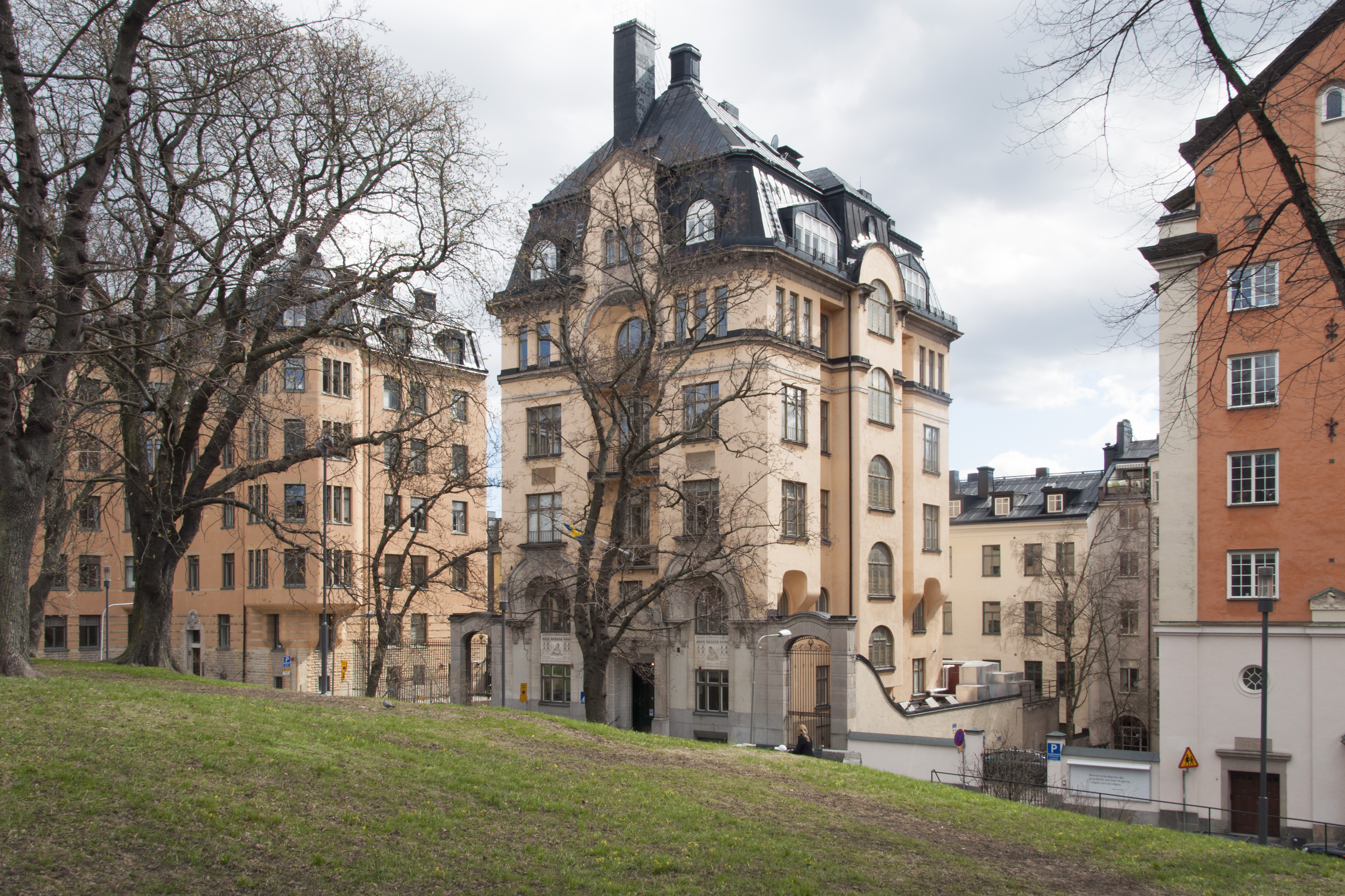 Tegnerlunden 5